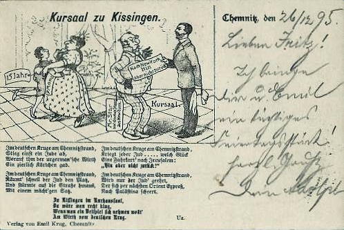 Karikatur-Postkarte zur Bad Kissinger Louis-Stern-Affäre